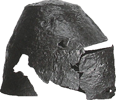 Great helm